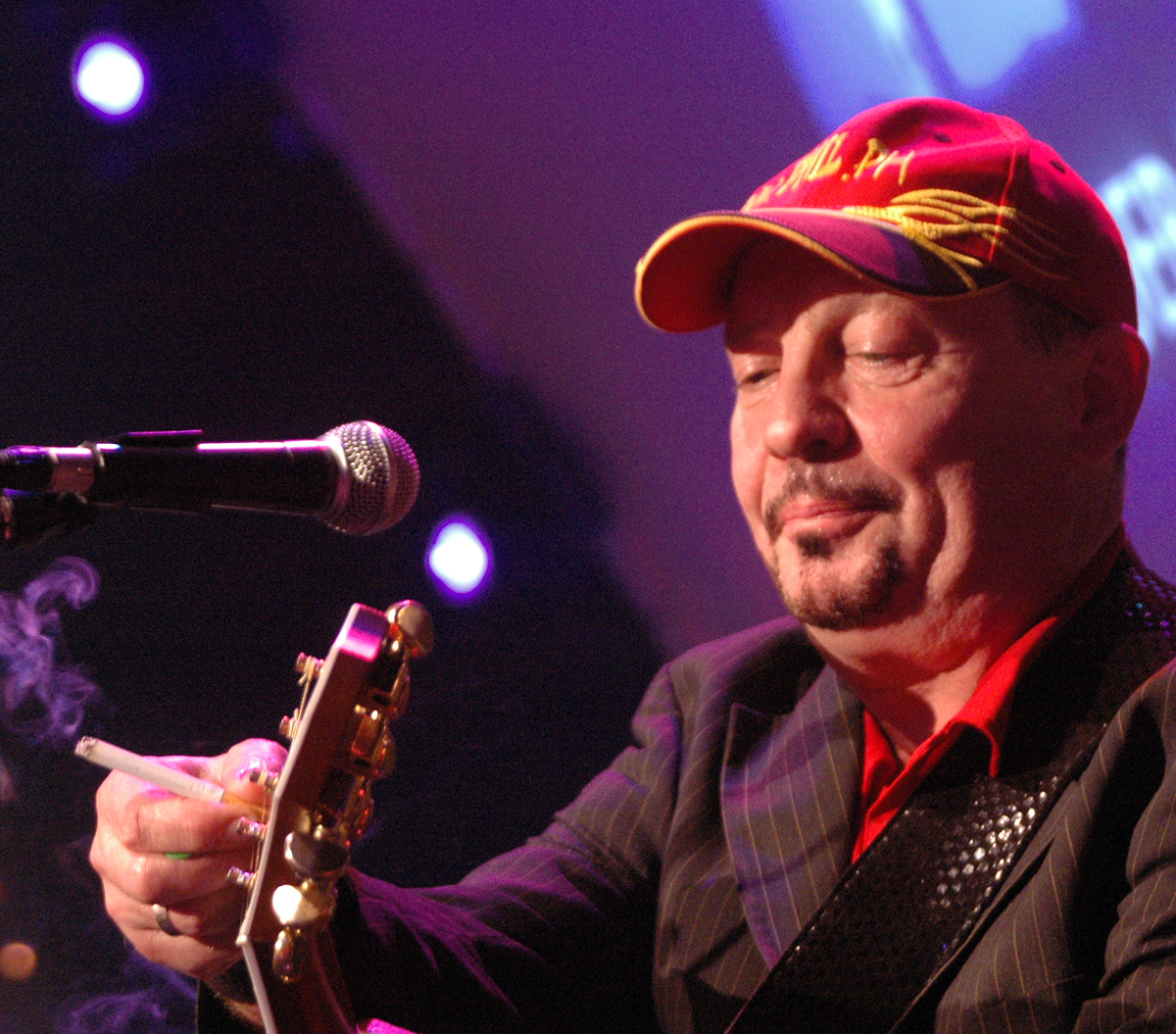 Gerhard Gmell („Barny Murphy“) mit seiner typisch griffbereitgelagerten Zigarette